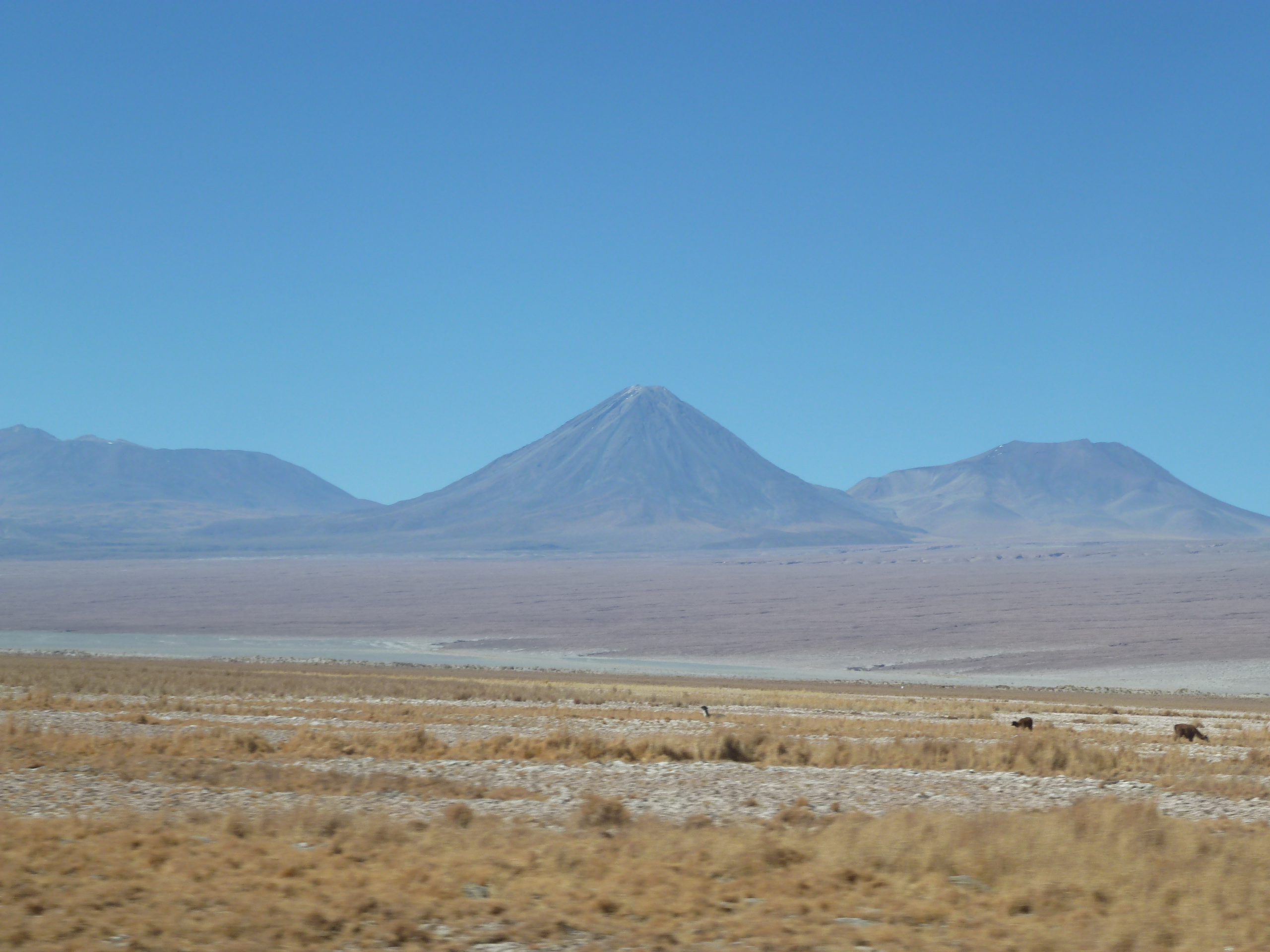 Atacama